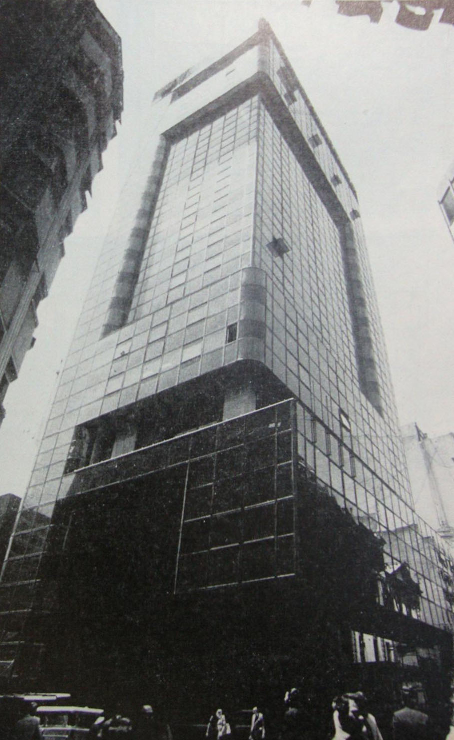 Torre del Banco do Brasil en Buenos Aires, Argentina. arquitectos: Raña Veloso, Álvarez, Forster Años: 1973/77 Dirección: Sarmiento esq. San Martín